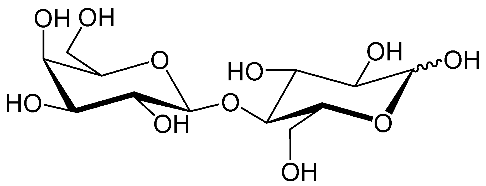 Lactose